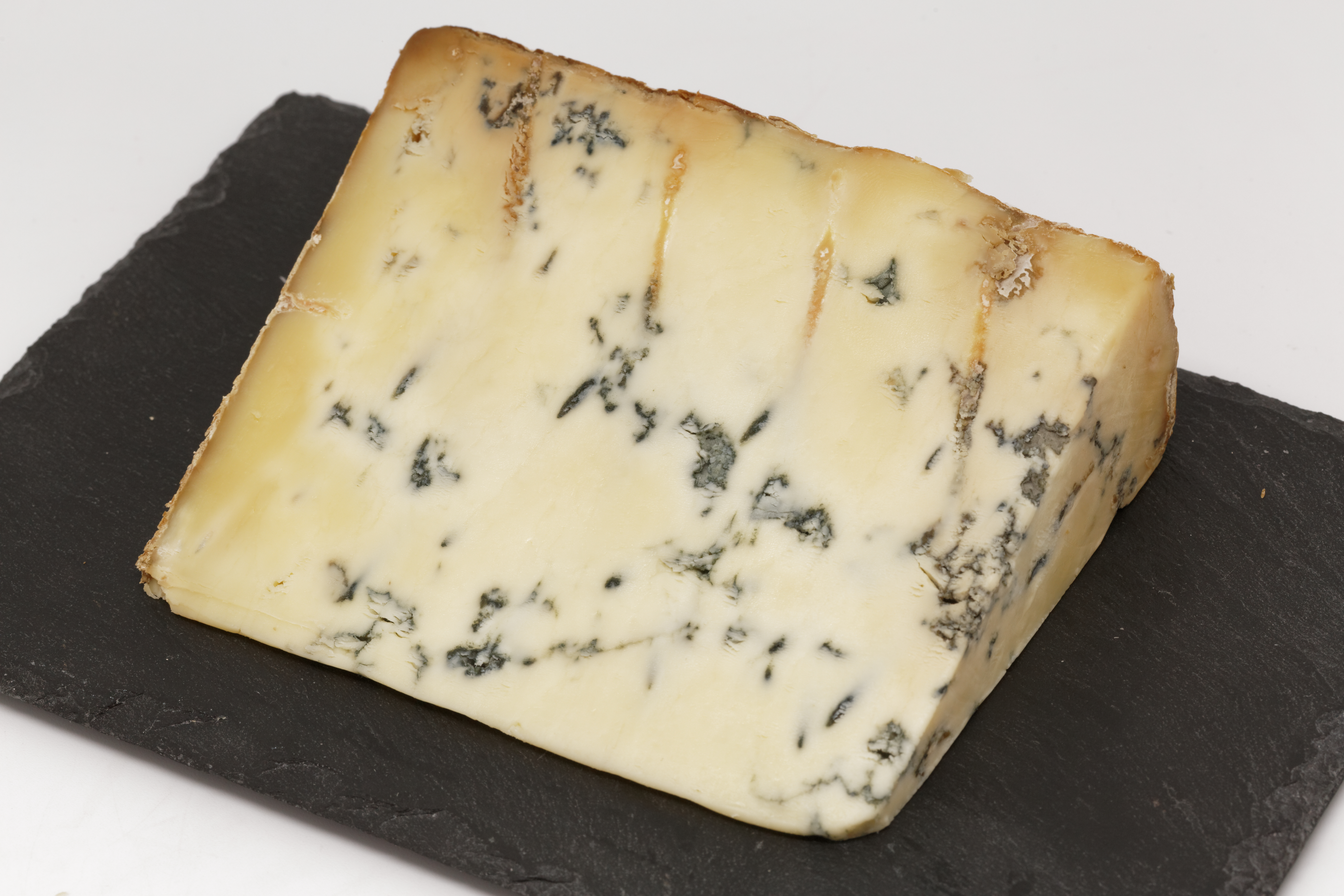 Le Stichelton, fromage du Royaume-Uni.